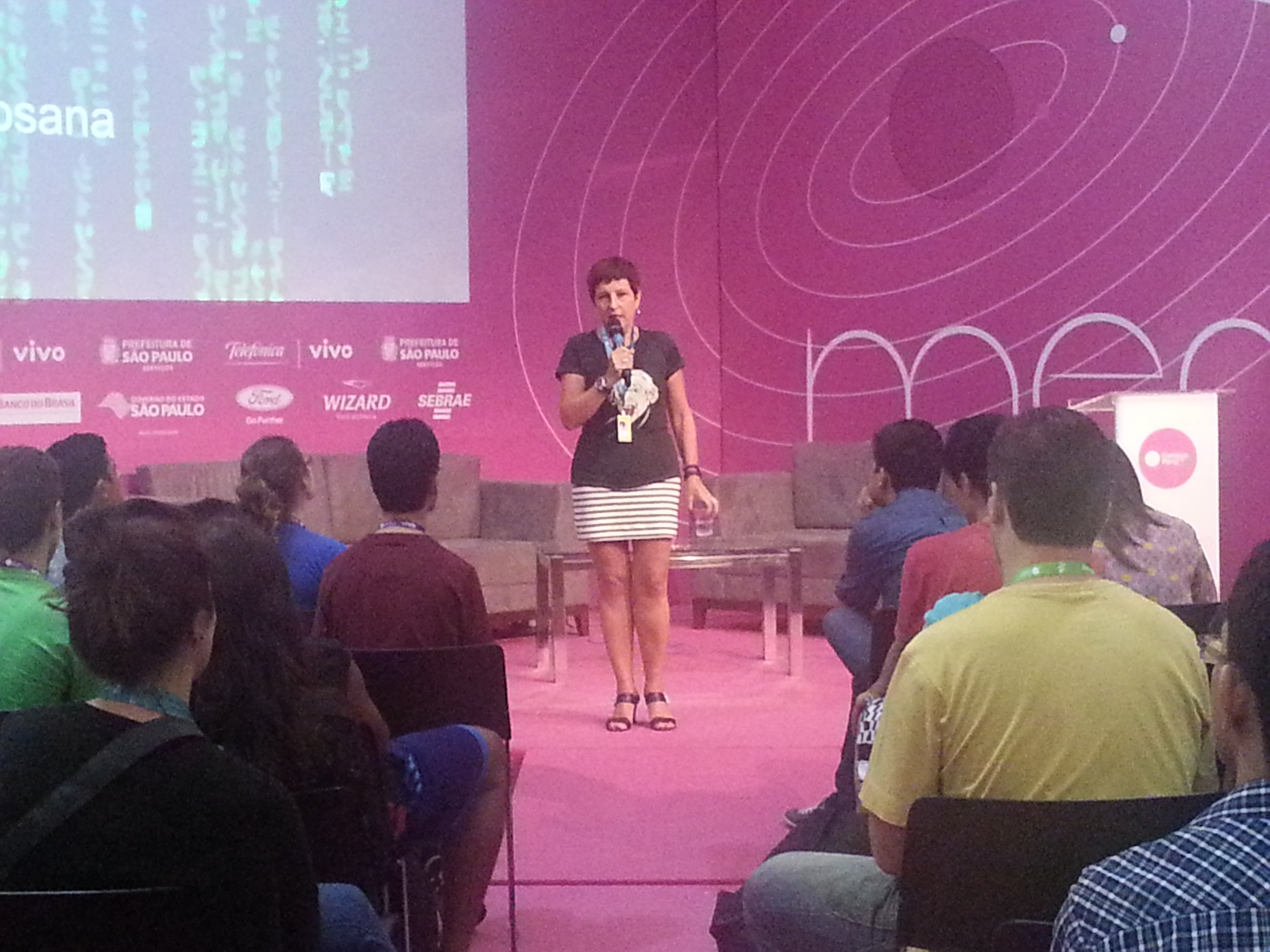 Português do Brasil: Palestra sobre: "Como lidar com a irracionalidade dos comentários na Internet? " de Rosana Hermann no Campus Party de 2015.